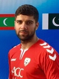 Anoush Dastgir zum Auftakt des SAFF Suzuki Cup 2015, der offiziellen Südasienmeisterschaft